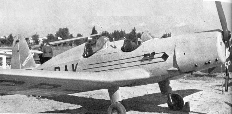 CSS-10C (Letectví, may 1949)